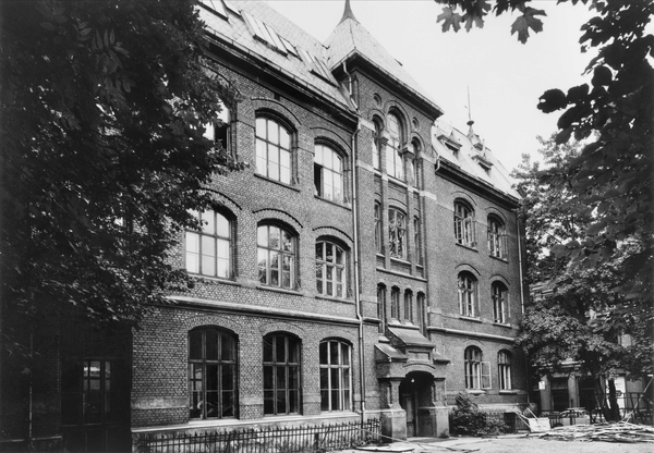 Hallings skole, skolegård.